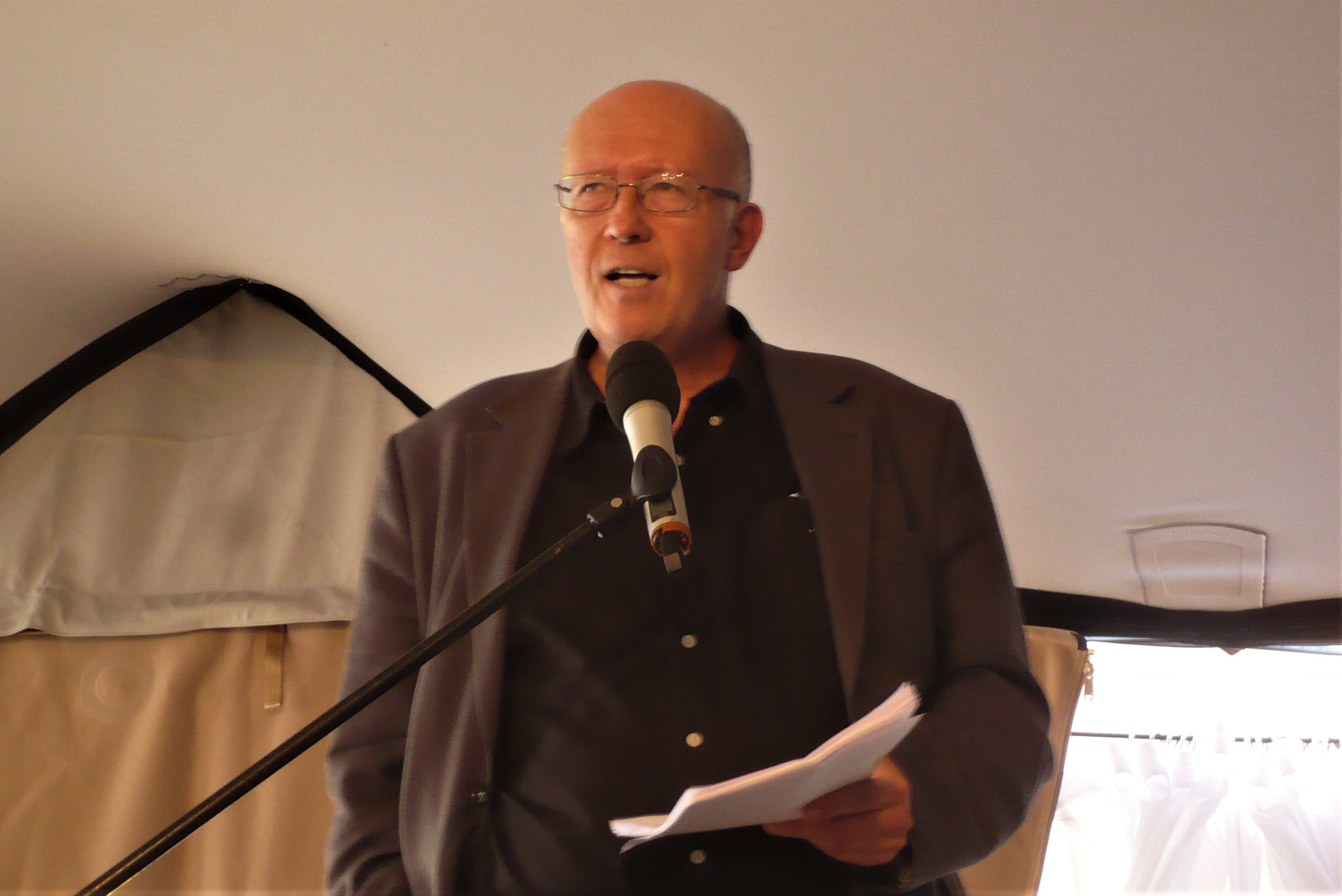 Jan Grabowski